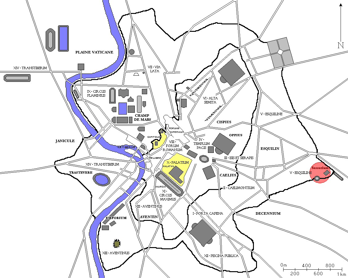 Plan de Rome redessiné à partir de diverses sources. Tous les bâtiments importants construits jusqu'à la fin de l'Empire romain sont dessinés, ainsi que les régions d'Auguste et les collines de Rome.